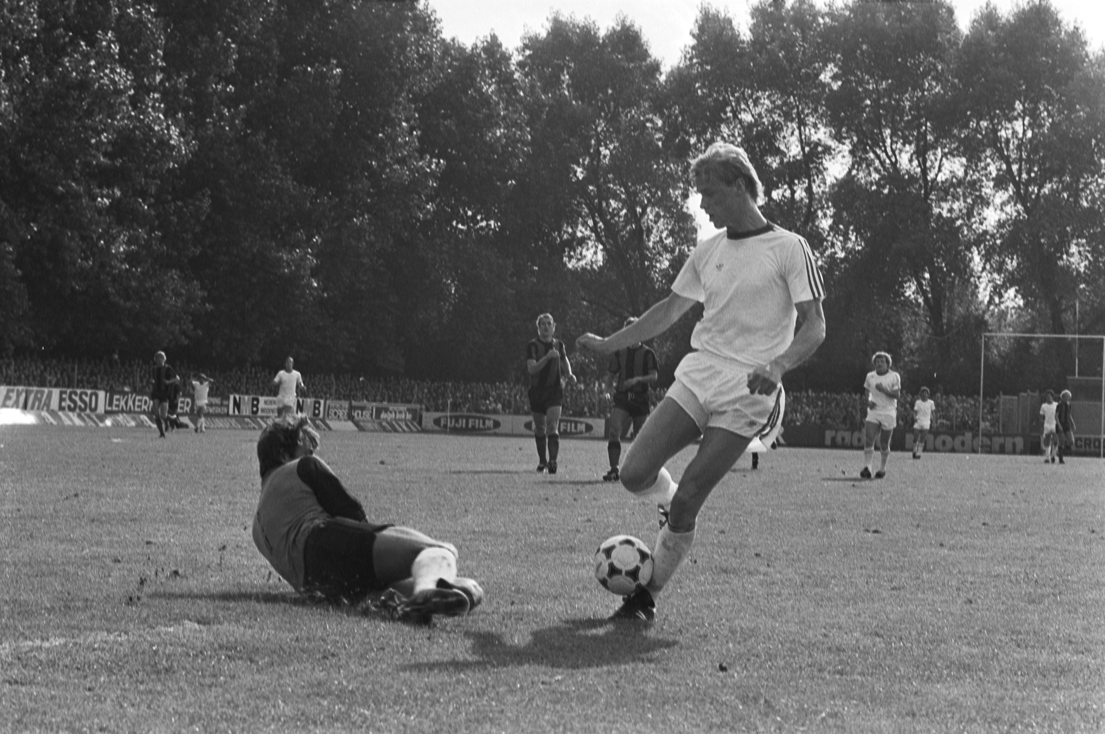 Collectie / Archief : Fotocollectie Anefo Reportage / Serie : [ onbekend ] Beschrijving : Excelsior - Feijenoord 0-2; Petur Petursson scoort het eerste doelpunt langs doelman René Vermunt Datum : 23 september 1979 Locatie : Rotterdam, Zuid-Holland Trefwoorden : sport, voetbal Persoonsnaam : Petursson, Petur, Vermunt, René Instellingsnaam : Excelsior, Feyenoord Fotograaf : Croes, Rob C. / Anefo Auteursrechthebbende : Nationaal Archief Materiaalsoort : Negatief (zwart/wit) Nummer archiefinventaris : bekijk toegang 2.24.01.05 Bestanddeelnummer : 930-4560